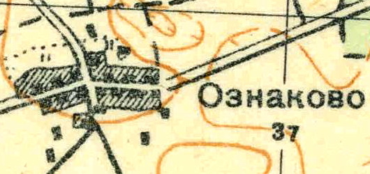 Топографическая карта Ленинградской области, квадрат О-35-24-А-г (Горки), деревня Ознаково